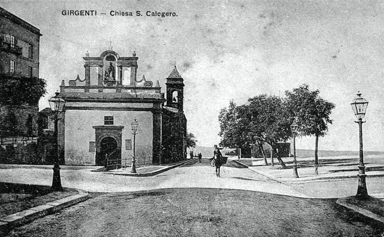 La Chiesa di San Calogero tra la fine dell' 800 e l'inizio del '900